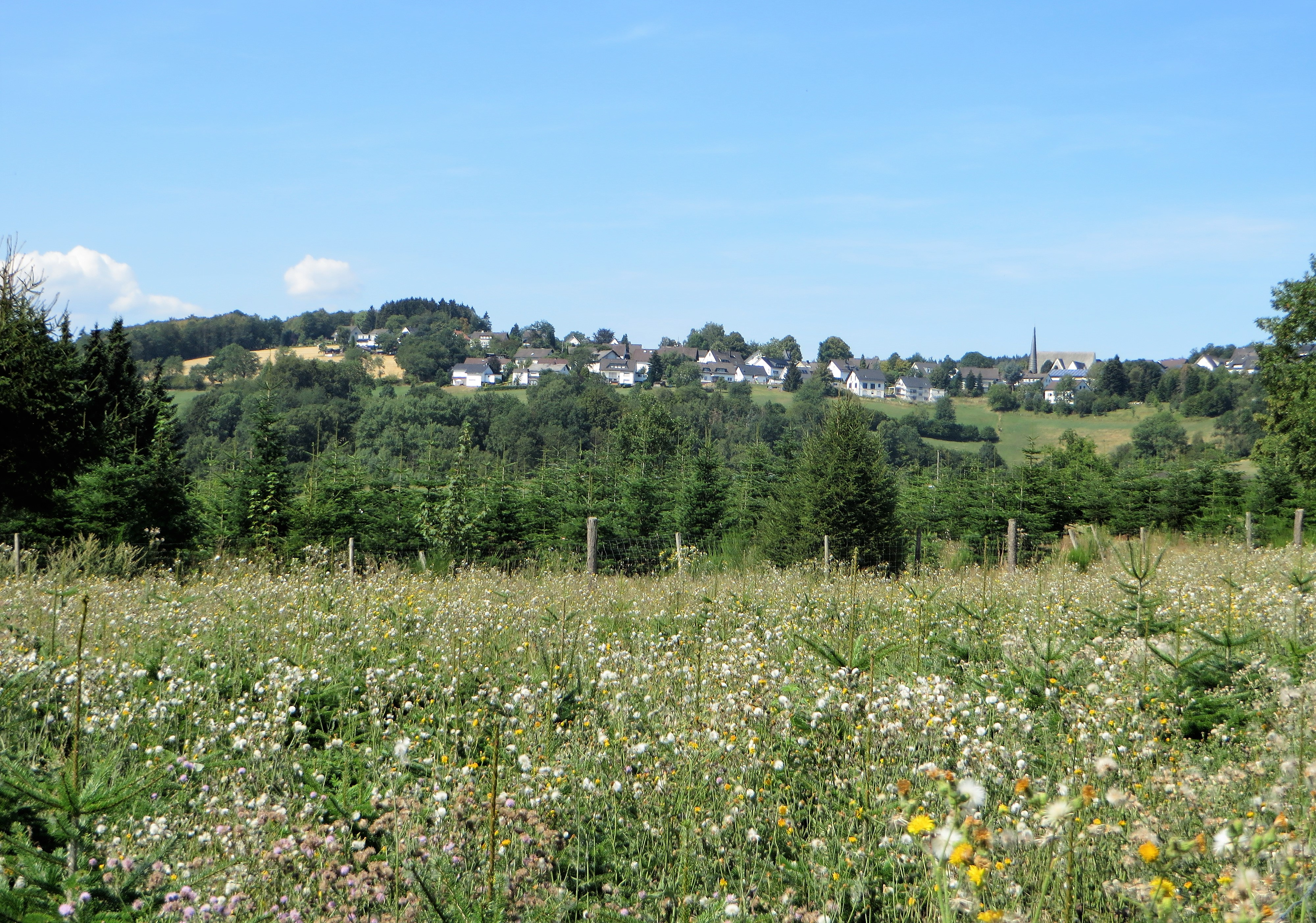 Blick von Osten auf den Attendorner Ortsteil Windhausen.